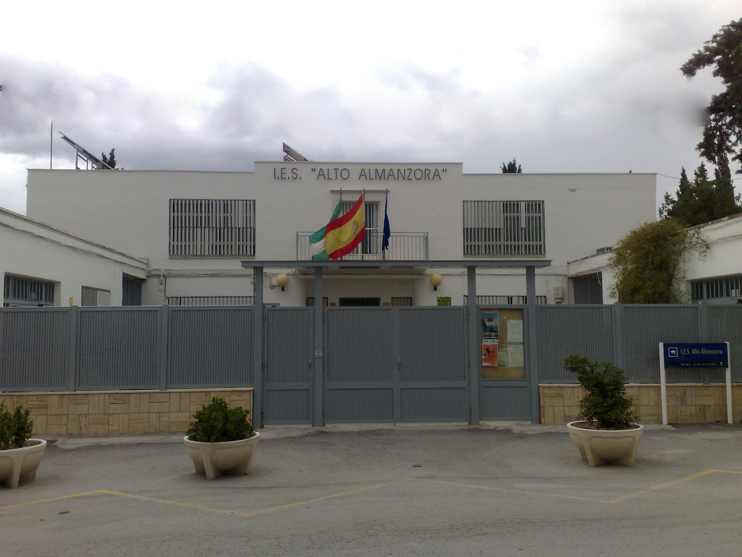 Entrada principal del I.E.S. Alto Almanzora. Situado en el municipio de Tíjola (Almería), próximo a las estribaciones de la Sierra de los Filabres, en la comarca denominada Valle del Almanzora, que toma el nombre del río que lo cruza.